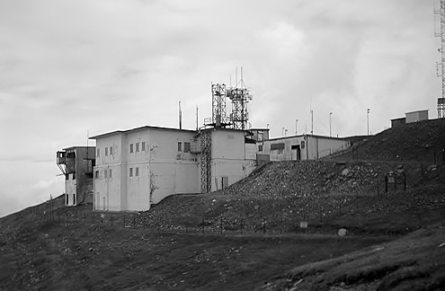 Base operative sulla Plose dell'aeronautica militare